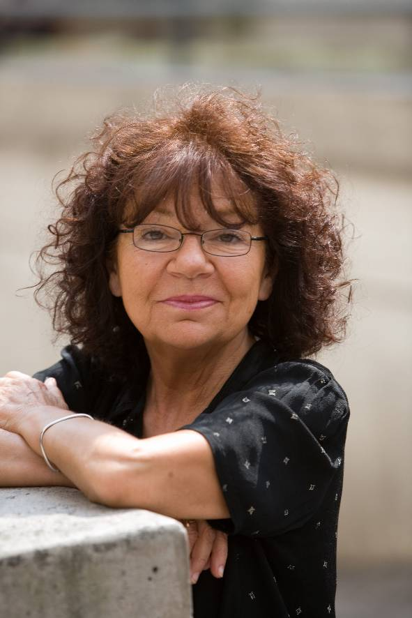 Photo de Jeanne Cordelier par John Foley